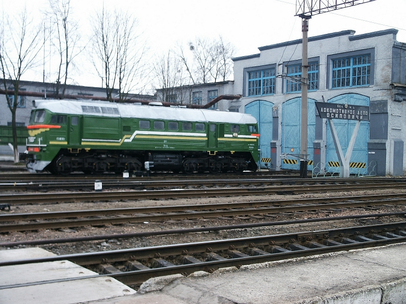 Assipowitschy